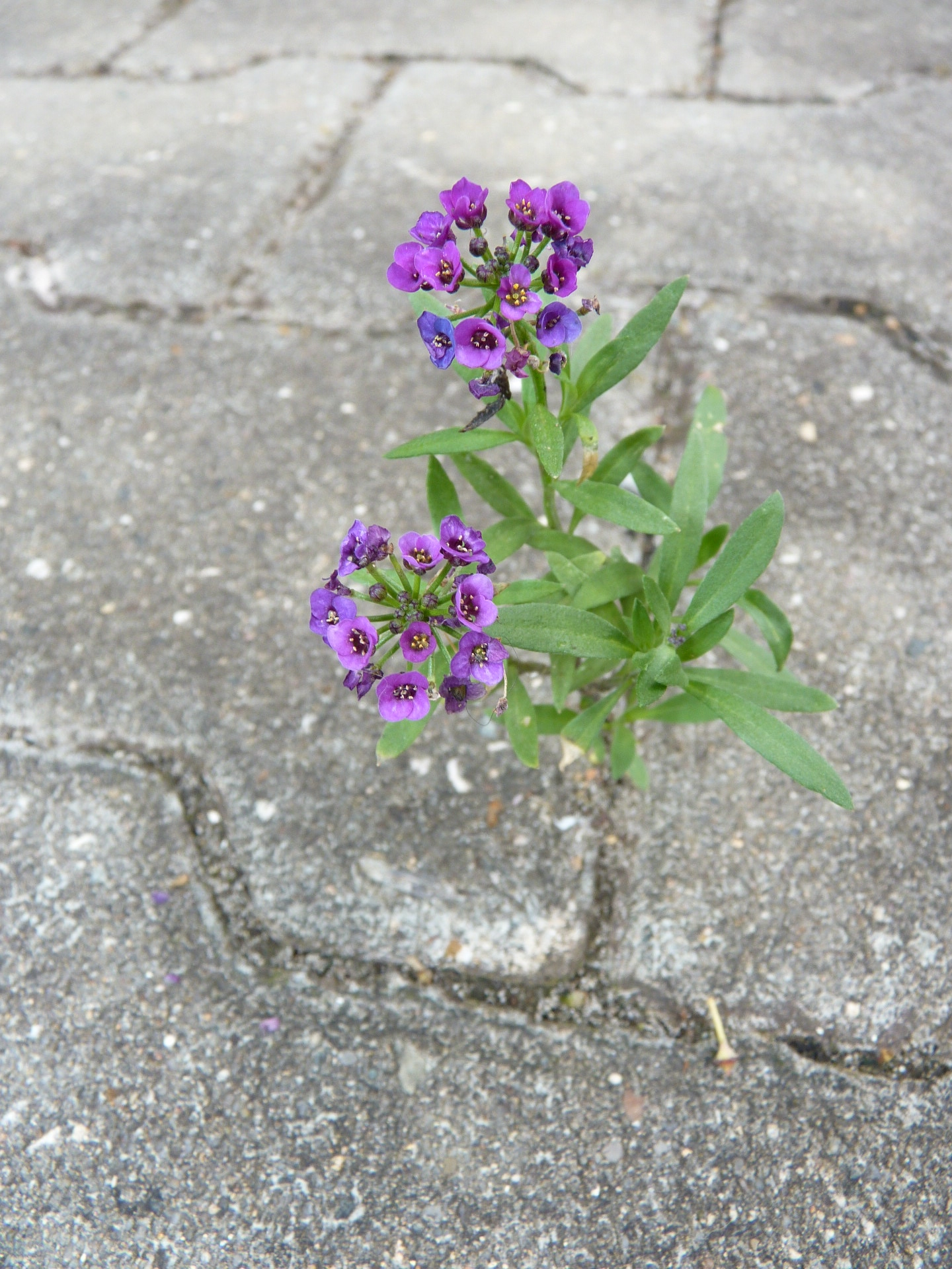 Strand-Silberkraut (Lobularia maritima), auch Strandkresse, Steinkraut oder Duftsteinrich